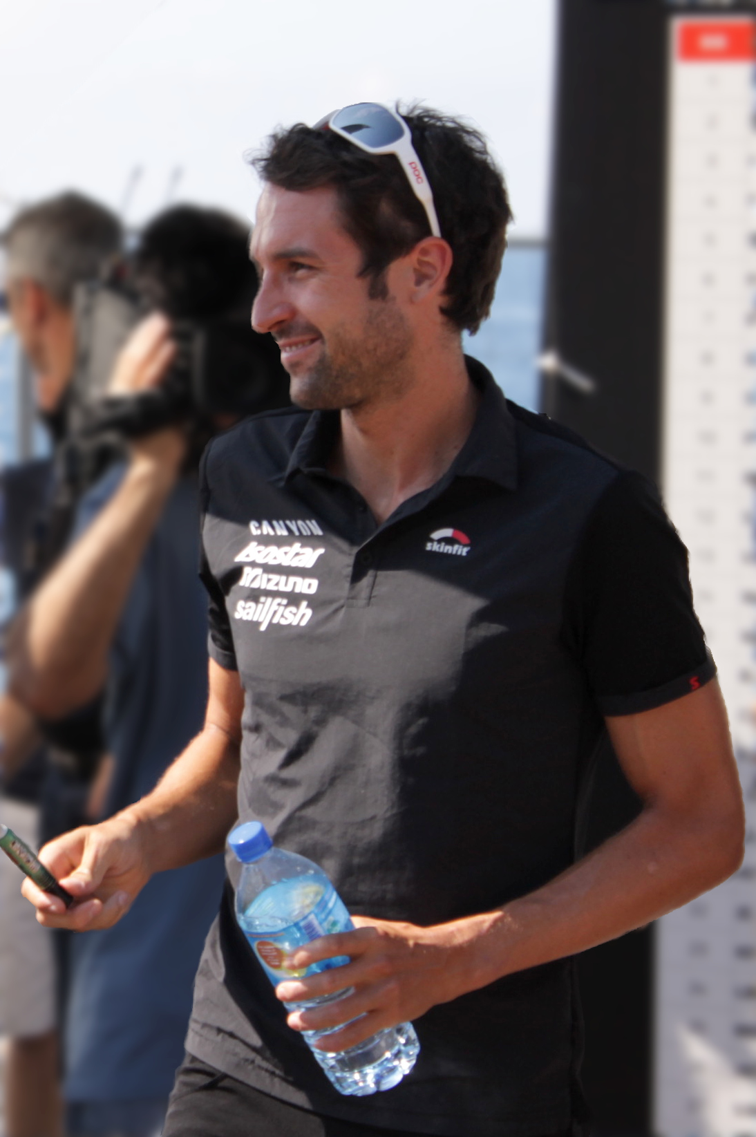 Boris Stein, Ironman France . Nice 2015